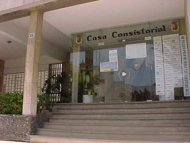 Office building (NOT town hall/Ayuntamiento!) de Puerto del Rosario, Fuerteventura